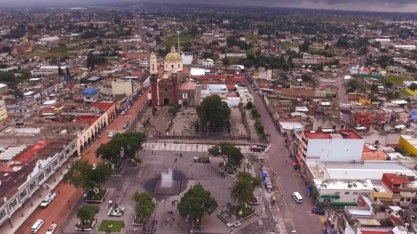 Centro histórico de Zacatelco, Tlaxcala